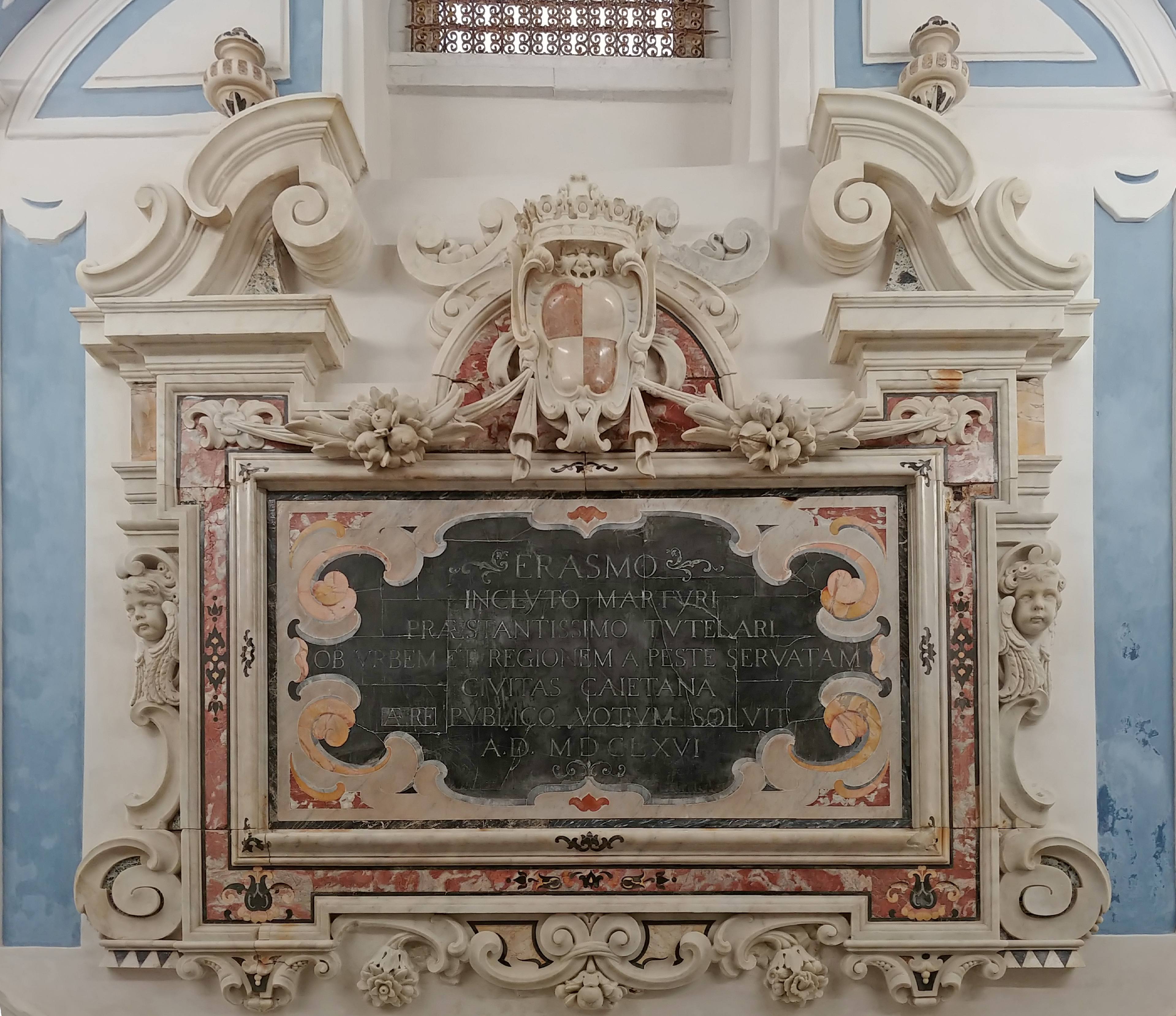 Lapide all'ingresso del succorpo.